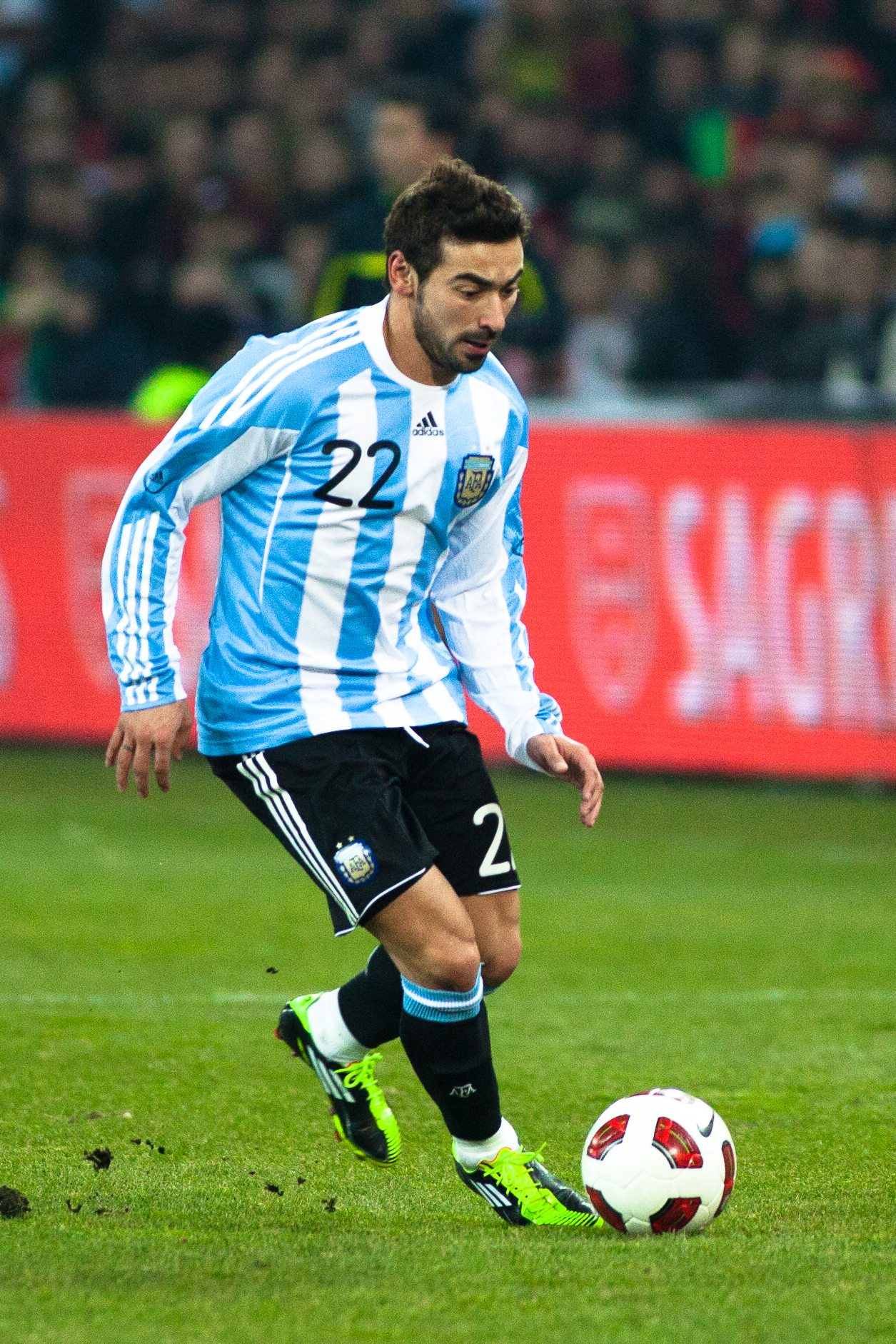 Ezequiel Lavezzi lors du match amical Argentine-Portugal le 9 février 2011 à Genève.